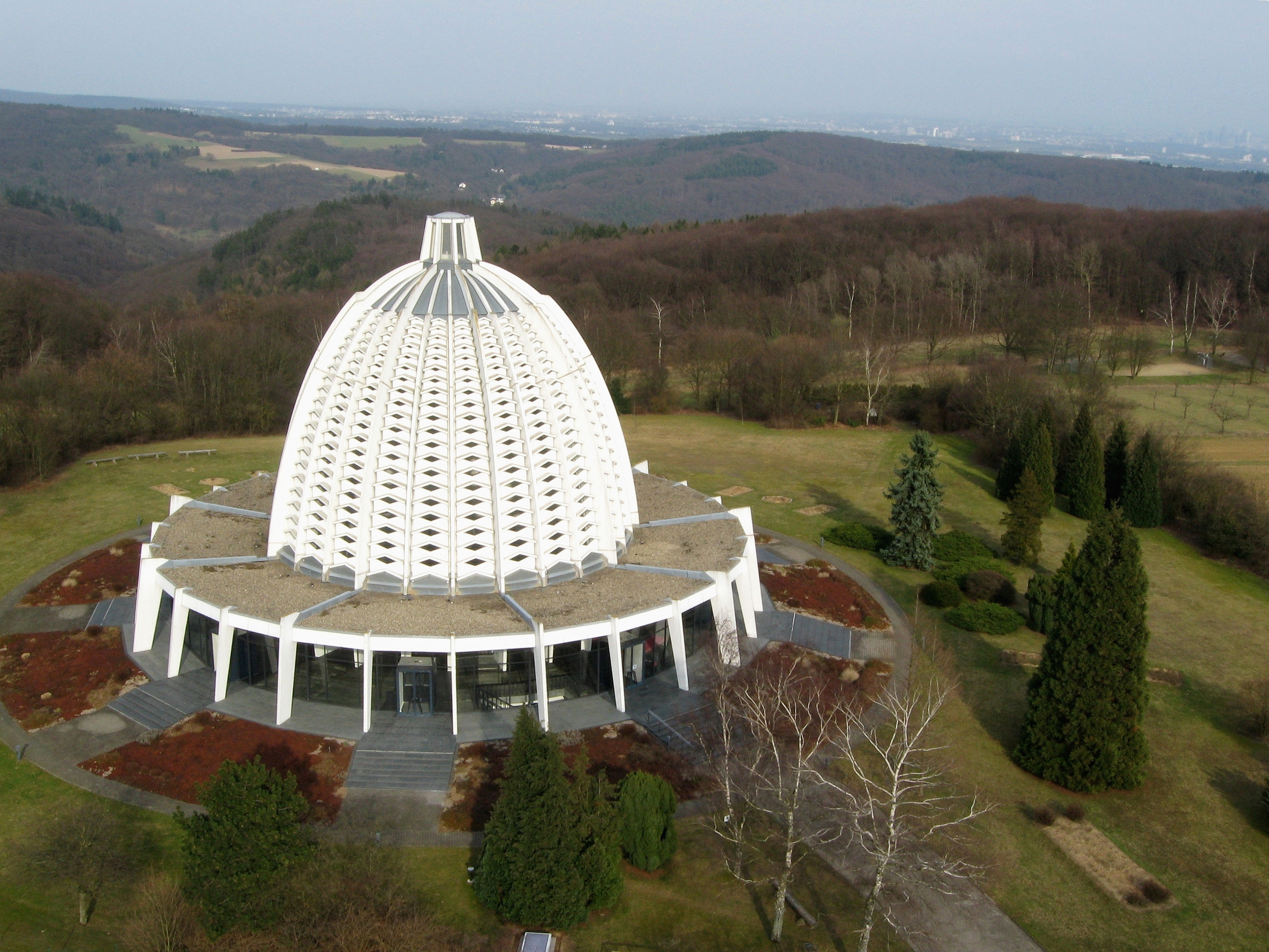 Haus der Andacht im Stadtteil Langenhain in Hofheim am Taunus.This is a photograph of an architectural monument.